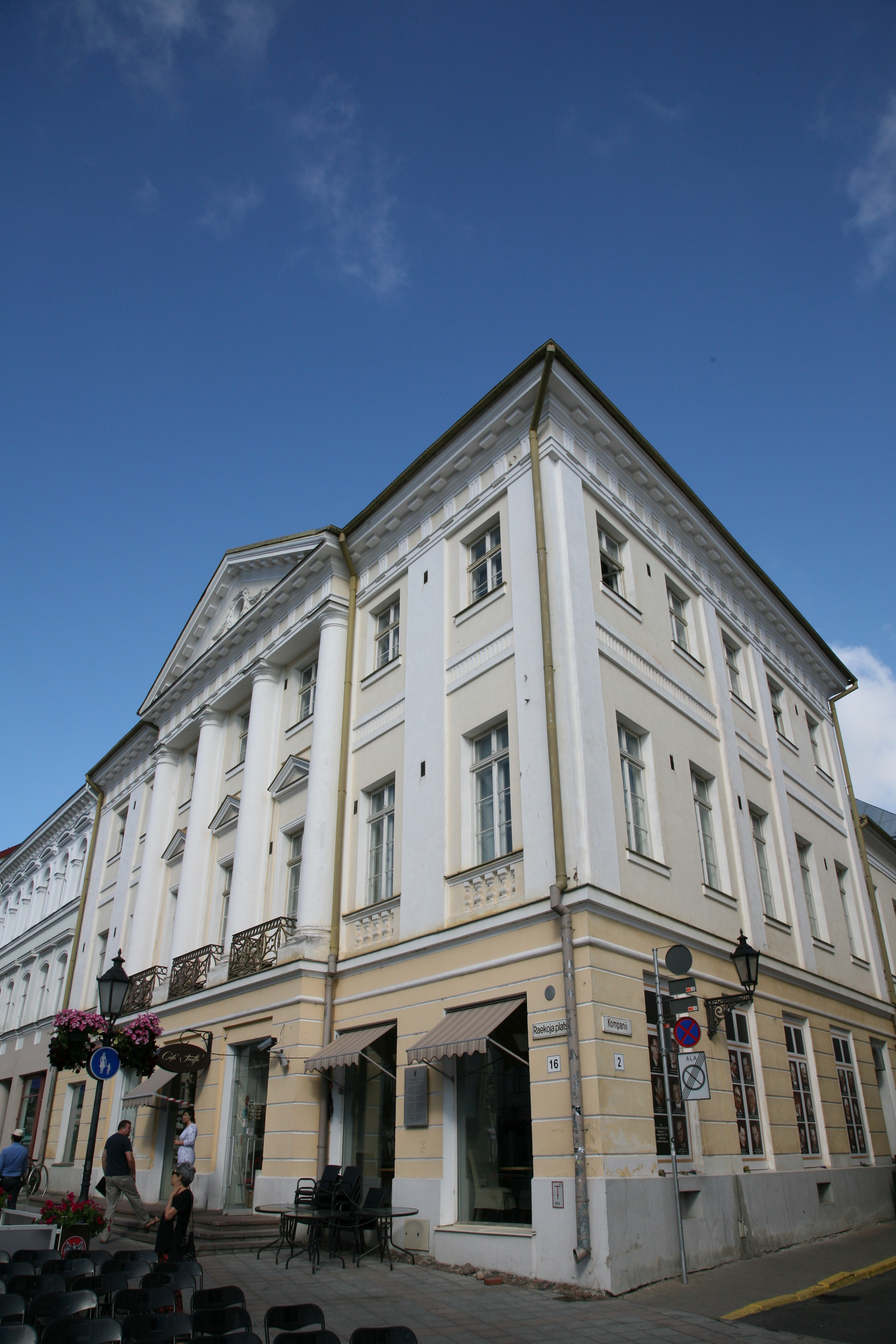 Tartu Kultuurihoone, nurgavaade Raeplatsilt, ees Tartuffi toolid. 4. august 2015